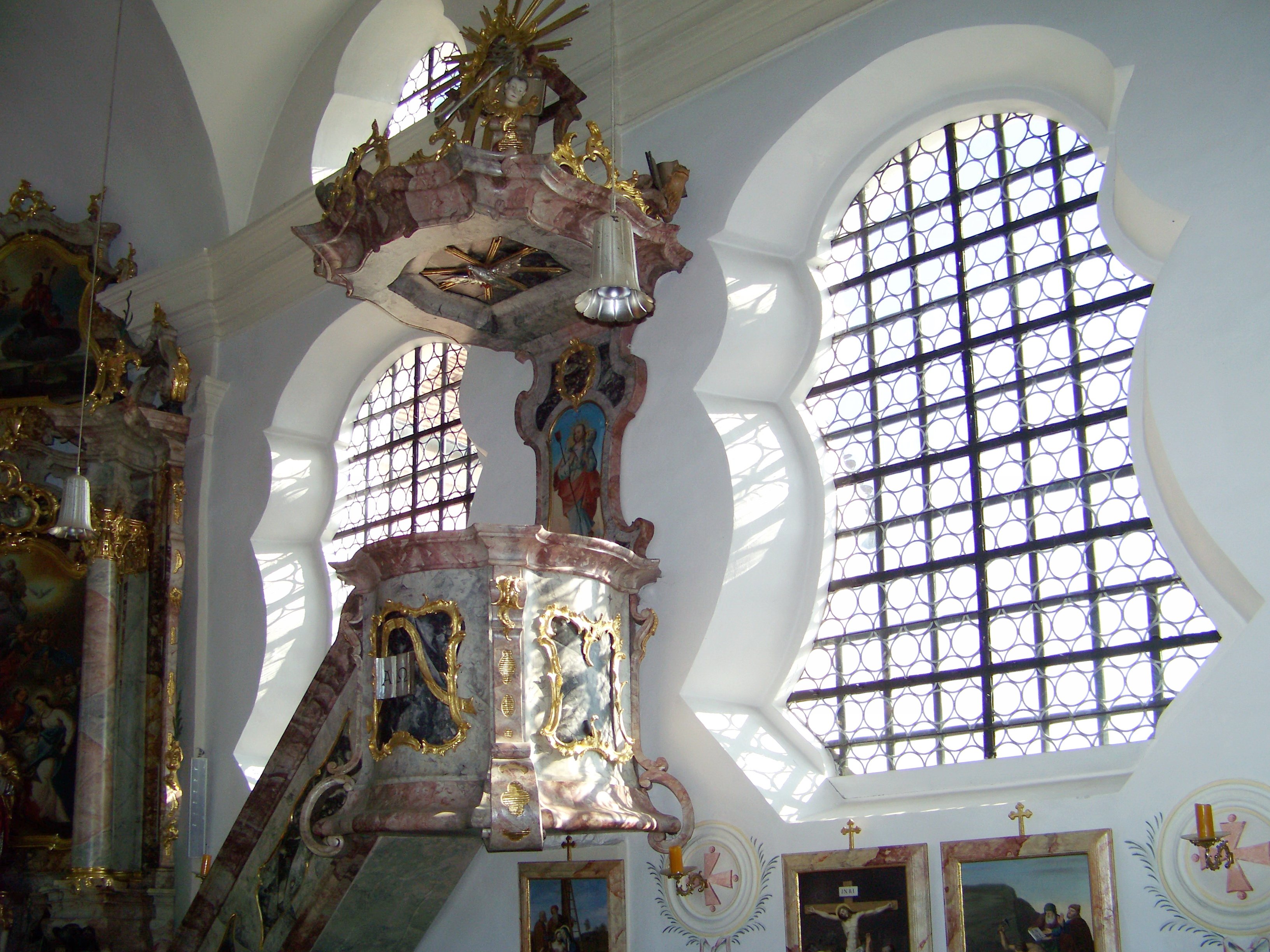 Neufahrn in Niederbayern. Hofendorf 28. Filialkirche St. Andreas. Saalkirche mit eingezogenem Chor und Westturm, Gliederung durch Lisenen und Putzbänder, Westturm mit Geschossgliederung, Achteckaufsatz und Zwiebelkuppel, 1747 von Johann Georg Hirschstötter; mit Ausstattung. Rokoko-Kanzel zwischen Bassgeigenfenstern an der Südwand des Kirchenschiffs.